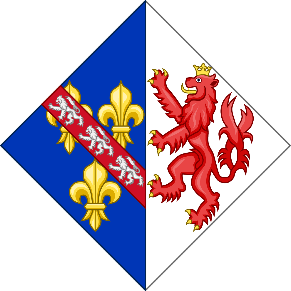 Armes de Marie de Luxembourg, comtesse héritière de Saint-Pol, comtesse de Vendôme